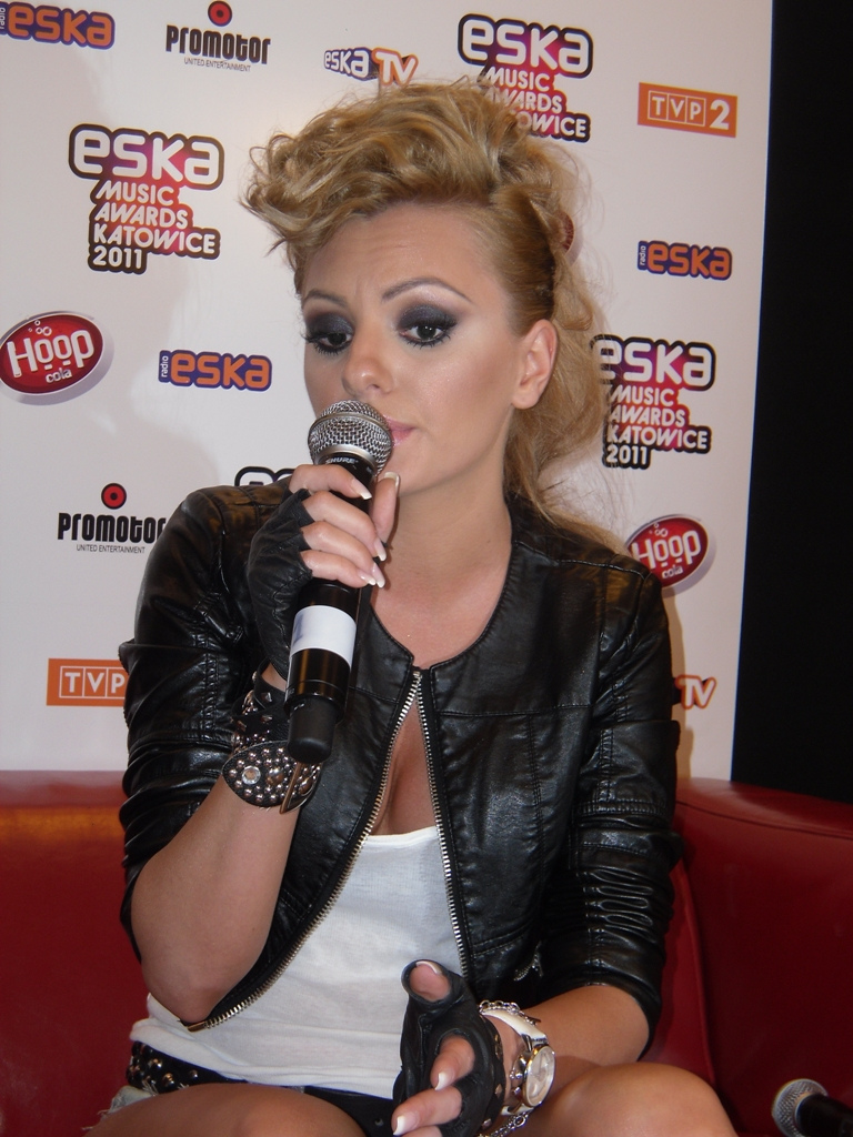 Alexandra Stan. Zdjęcie zrobione podczas Eska Music Awards 2011 w katowickim Spodku.